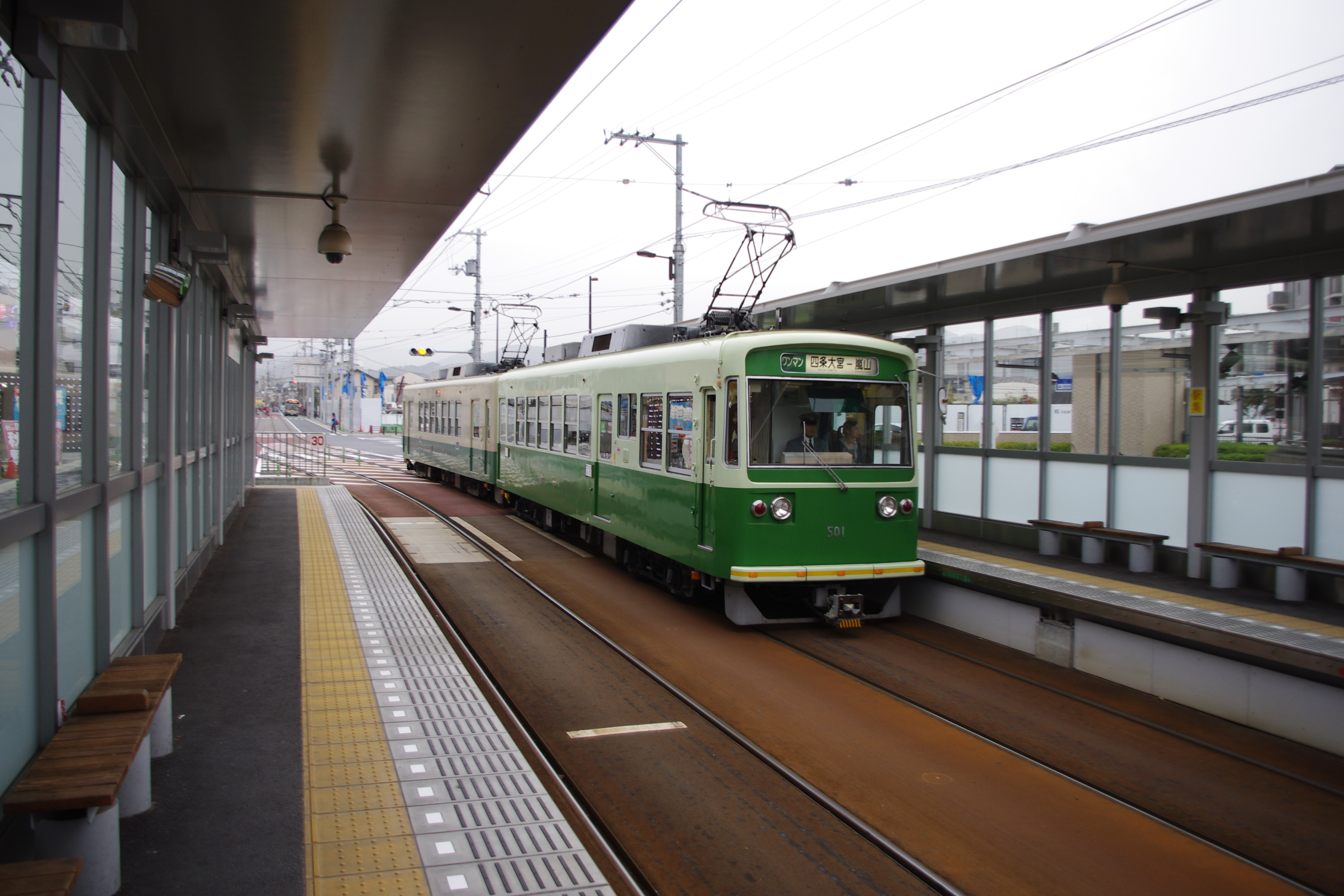 13 Nov, 2010